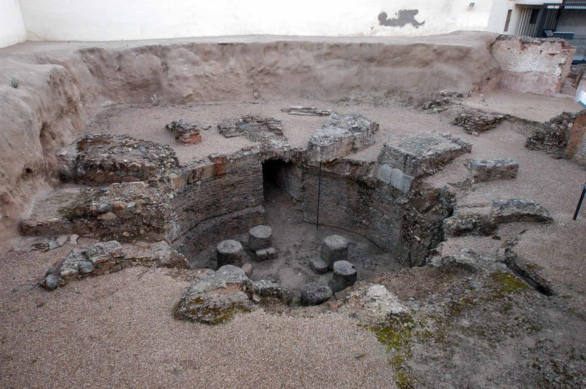 En época romana el comercio de la nieve se encontraba muy extendido en las zonas urbanas.